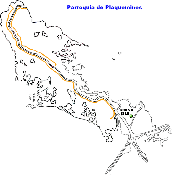 Mapa localizador de Grand Isle, ubicada en Plaquemines, una parroquia del Estado de Louisiana.